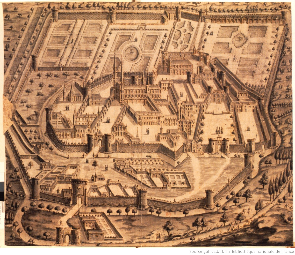 Ancien plan de l'abbaye Saint-Médard de Soissons fondée en 560 avec le château des Rois